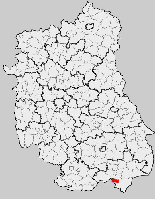 Map of gmina Bełżec, Tomaszów Lubelski county, Lublin voivodship Mapa gminy Bełżec, powiat tomaszowski, województwo lubelskie